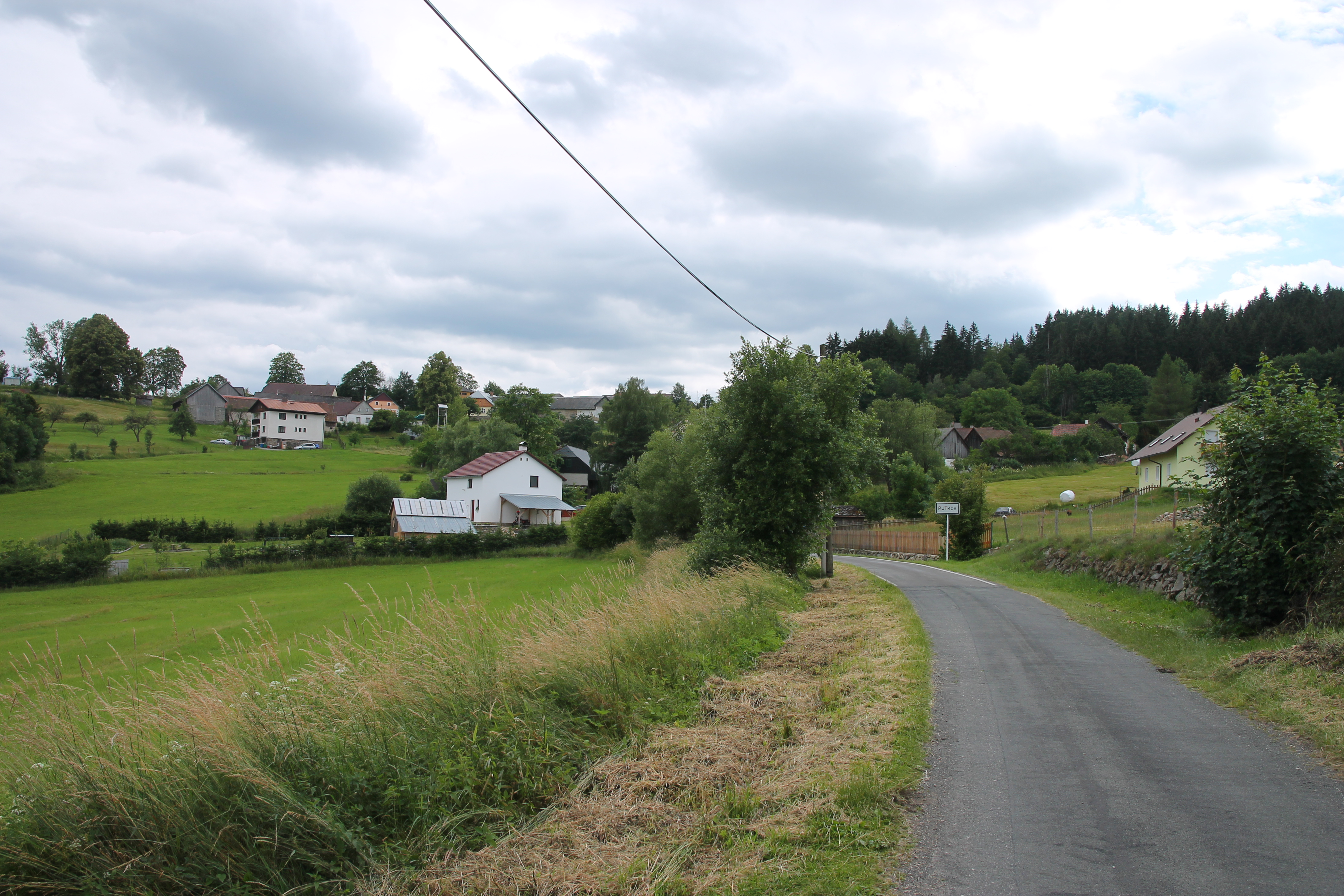 Pohled na Putkov od severu